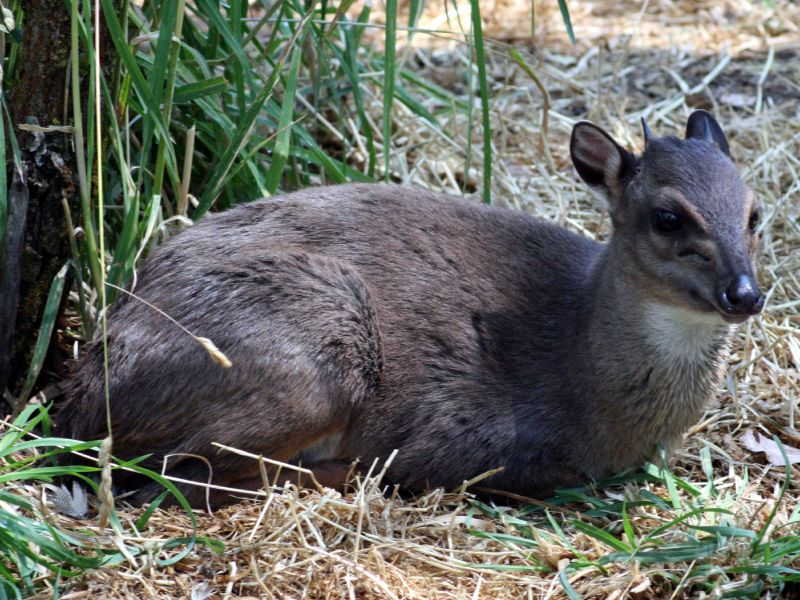 Blue Duiker (Philantomba monticola)